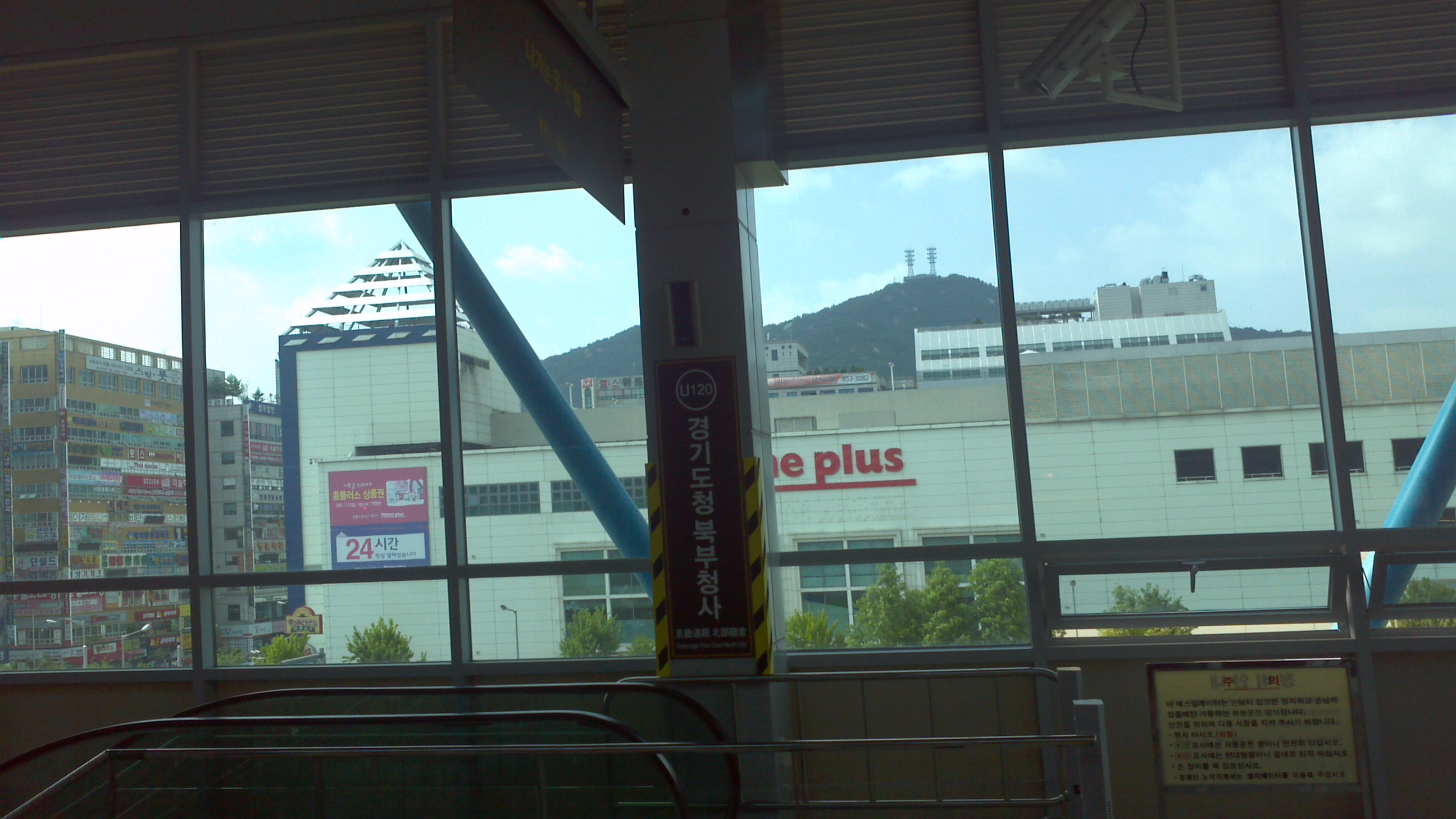 범골역 역명판